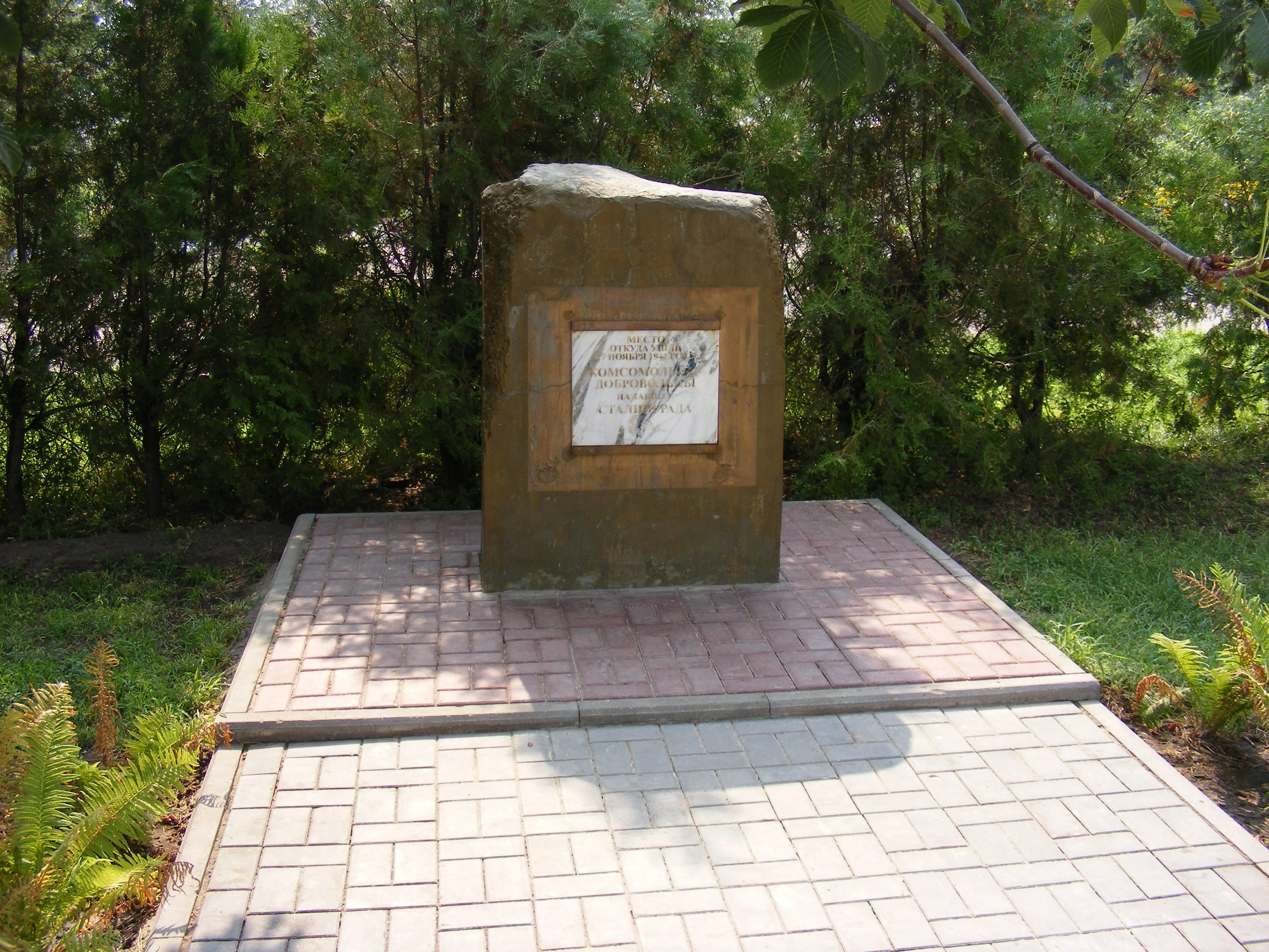 Памятная стела в Камышинском парке культуры и отдыха. Надпись на ней: «Место, откуда ушли 17 ноября 1942 года комсомольцы-добровольцы на защиту Сталинграда»